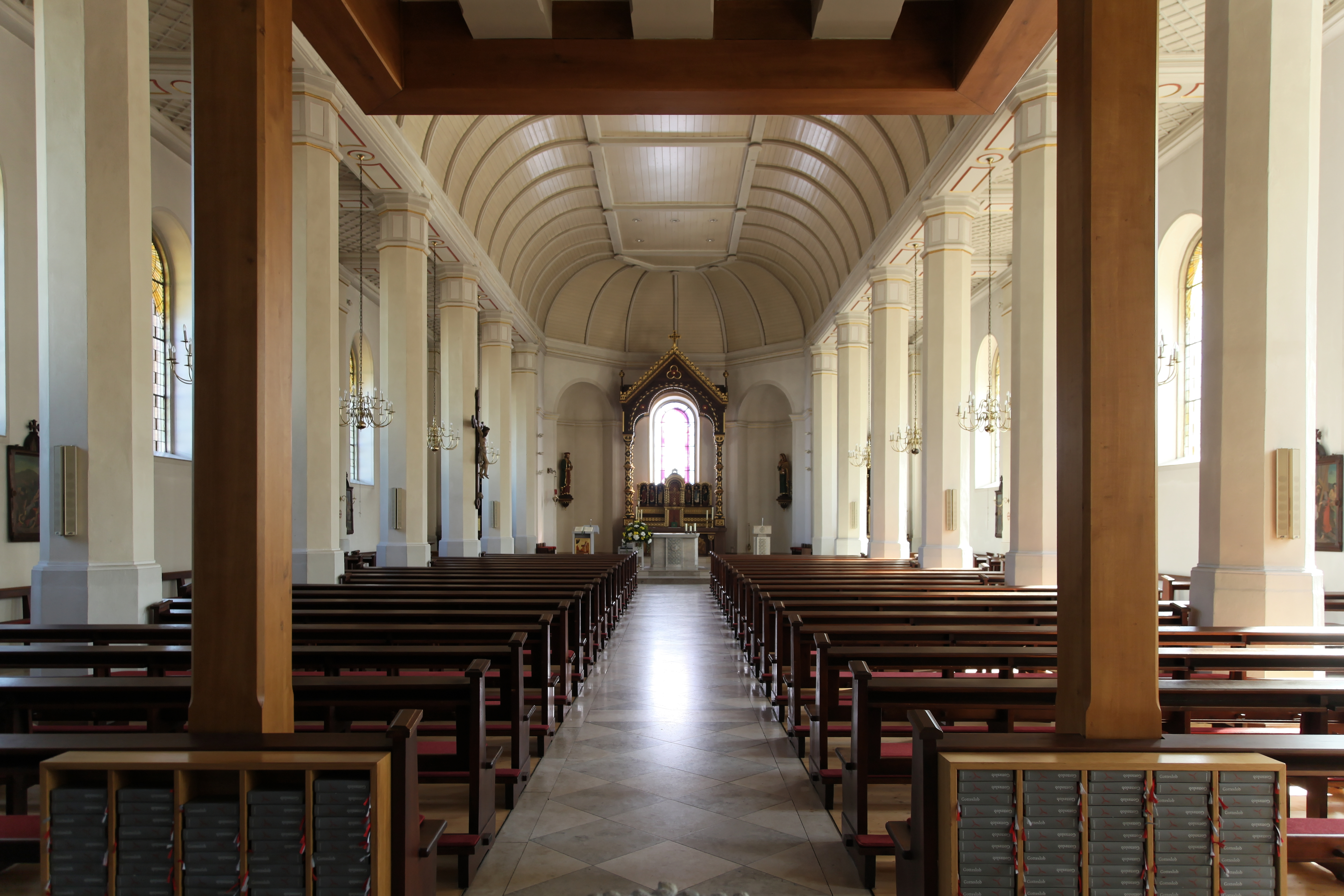 St. Cosmas und Damian, Lange Straße in Barßel